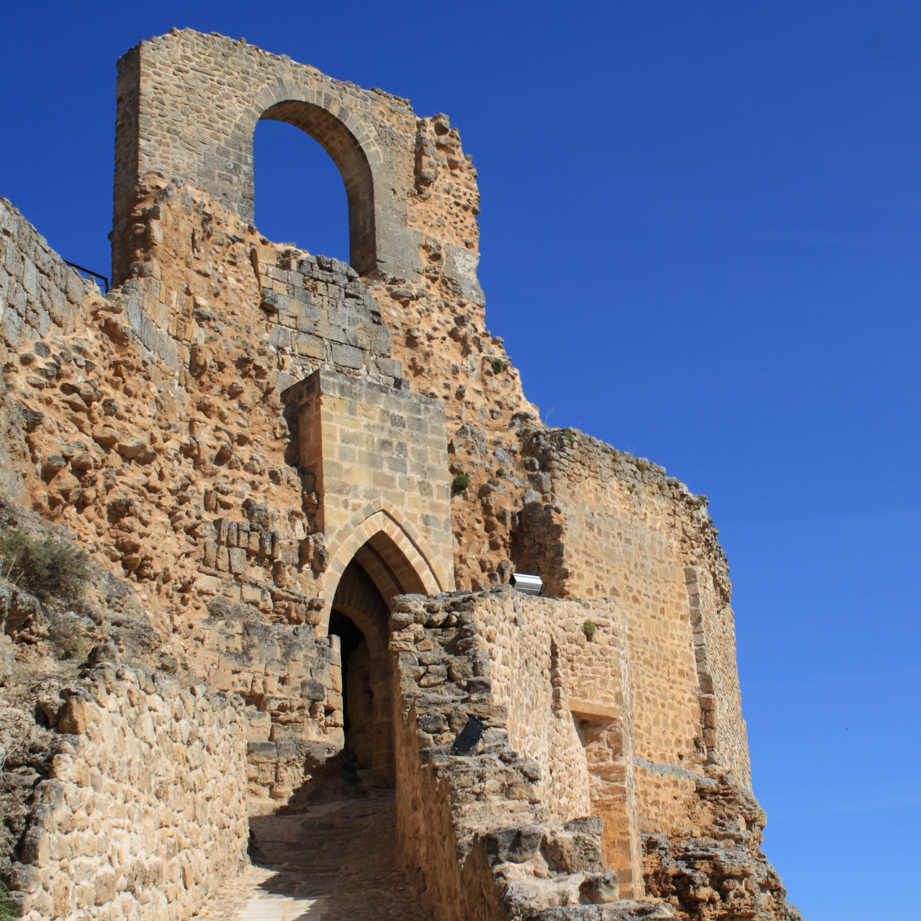 Castillo Zorita de los Canes Provincia de Guadalajara Castilla-La Mancha España